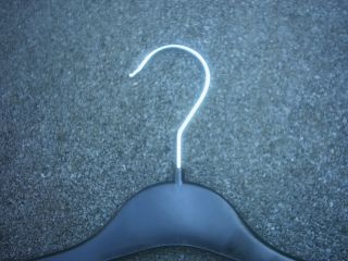 De haak aan het einde van een kledinghangertje